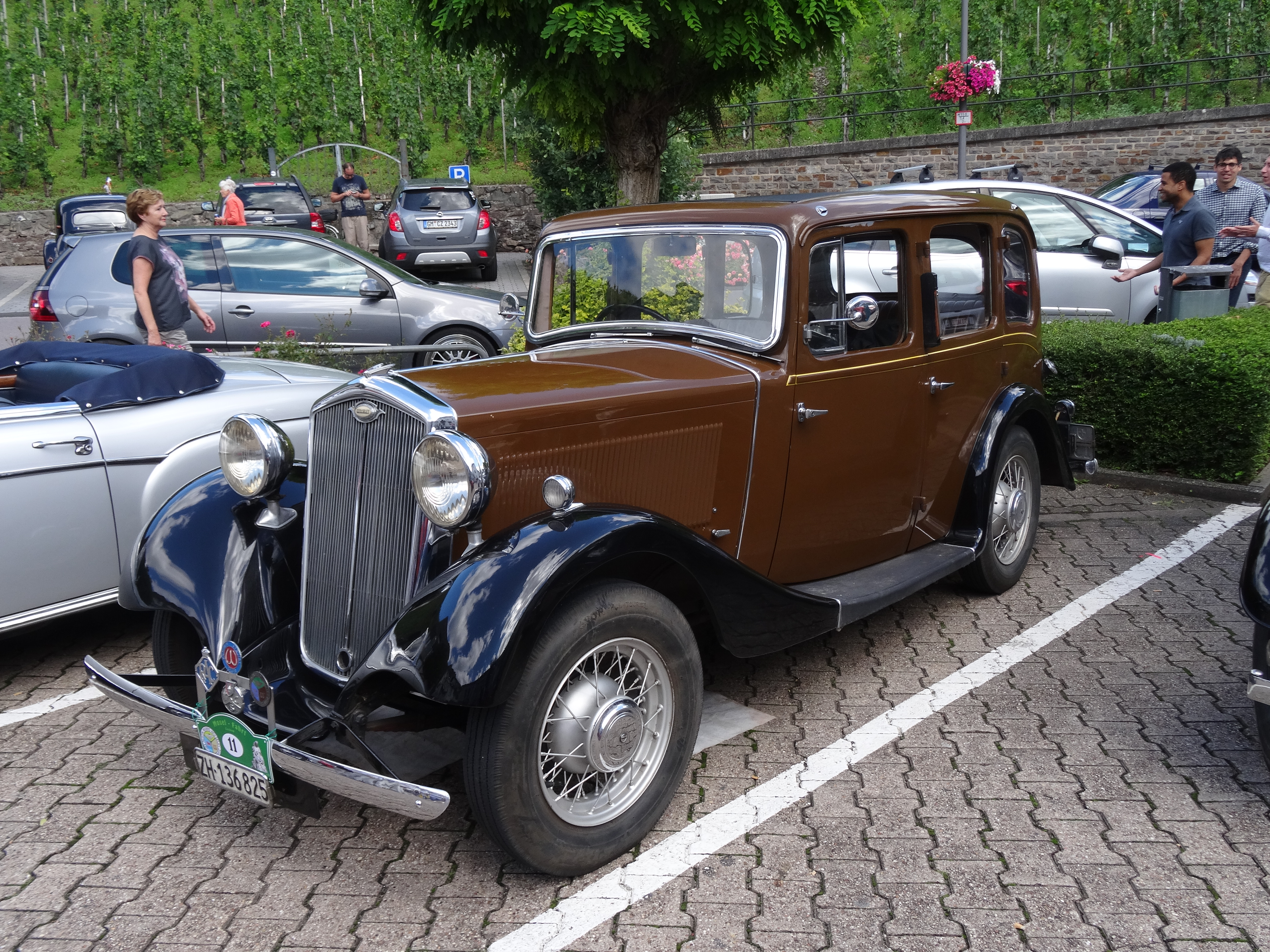 Wolesley Wasp (Bj. ca. 1936)